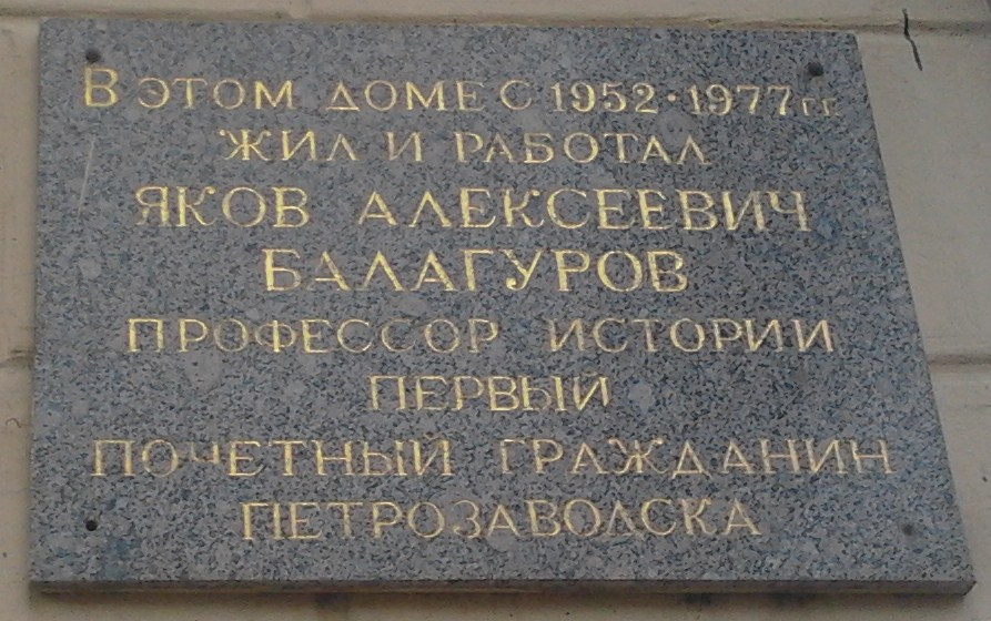 Мемориальная доска в Петрозаводске на пр.Ленина,8